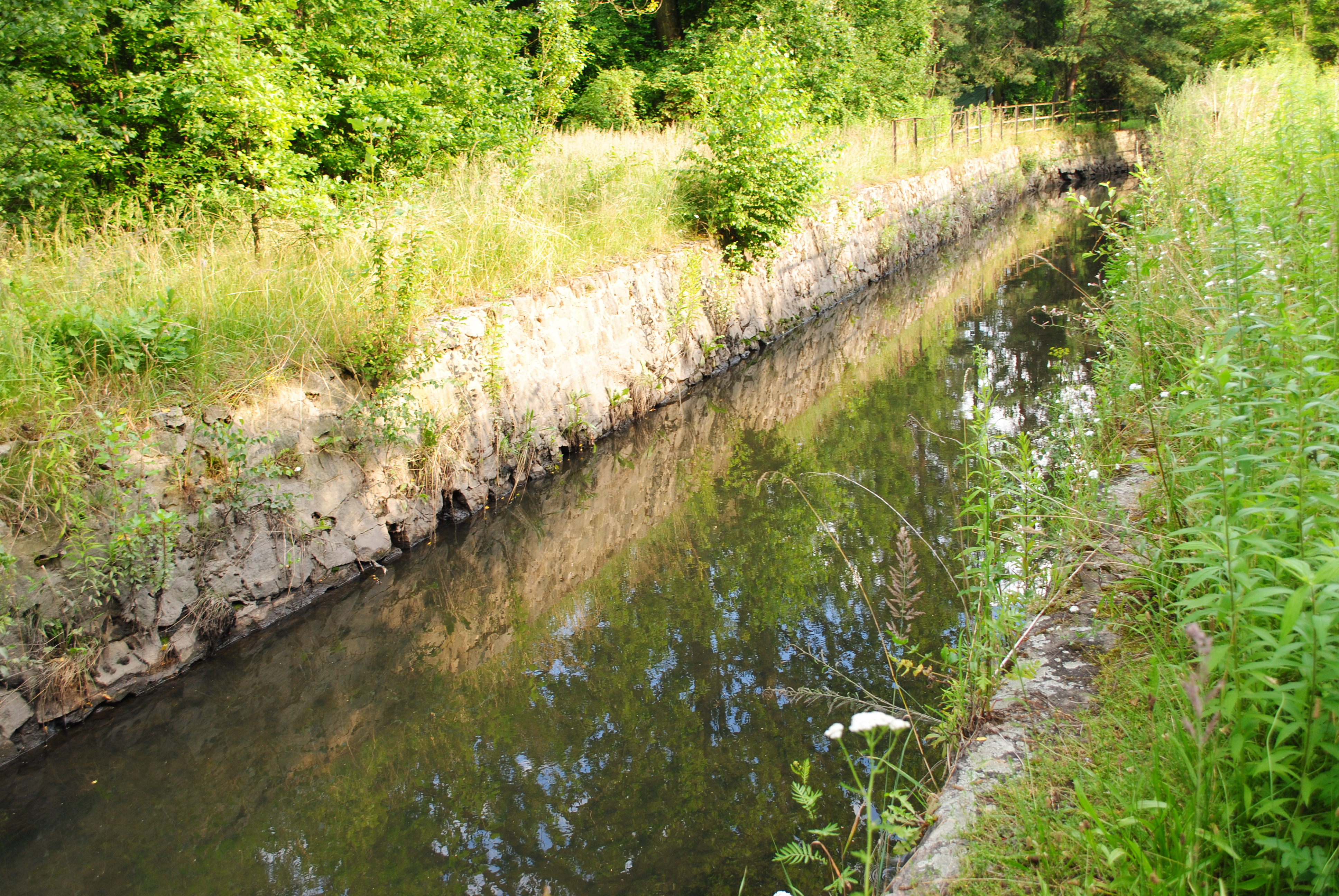 Katowice - Janów-Nikiszowiec. Bolina